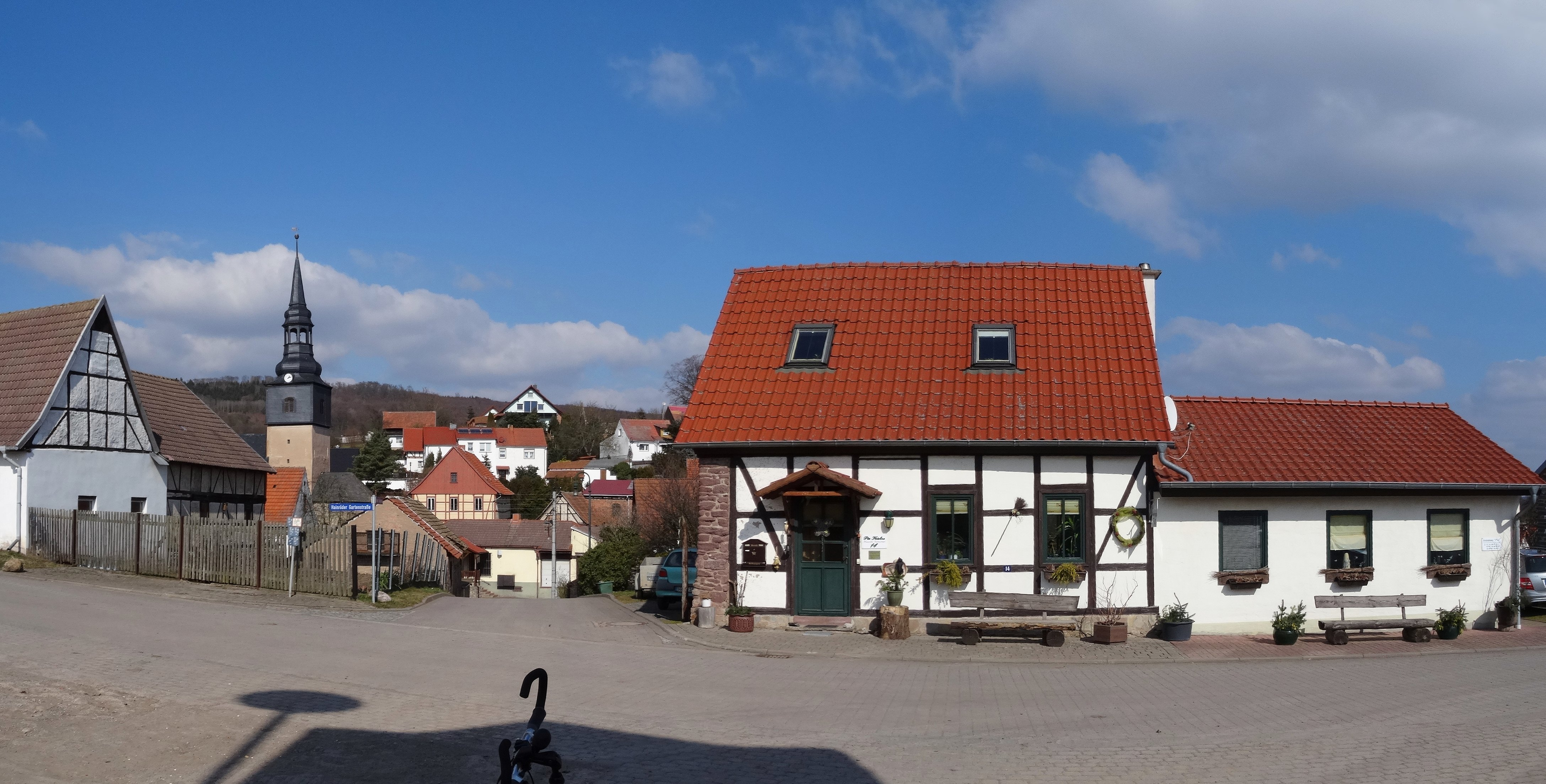 Dorfansicht Hainrode